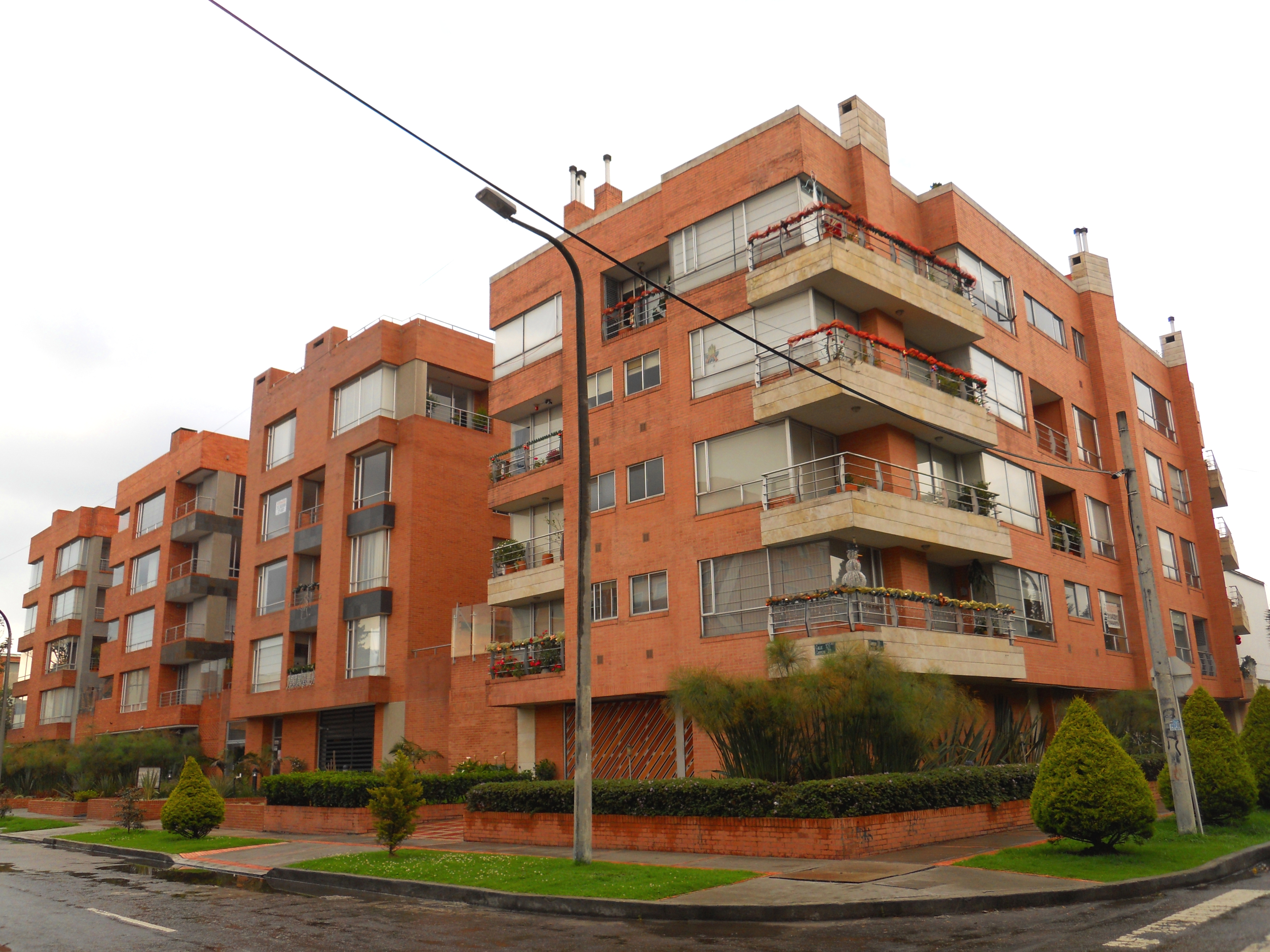 Bogotá barrio Santa Bárbara Occidental, calle 127bis con carrera 20.